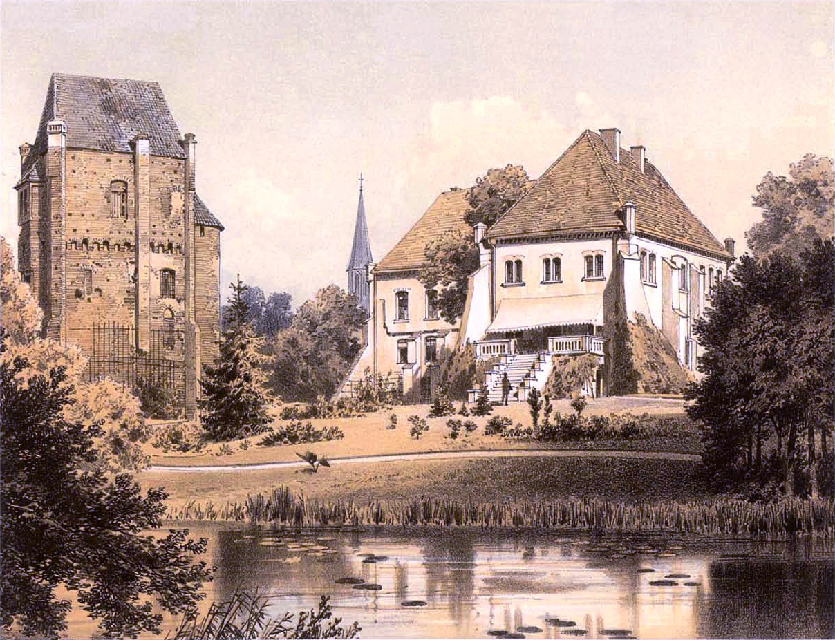 Schloss Samter, Kreis Samter, Provinz Posen